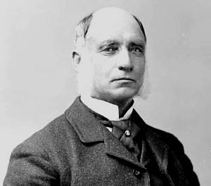 O'Brien, William, Edward M. P. (Muskoka, Ont.) Mar. 10, 1831 - 1914.